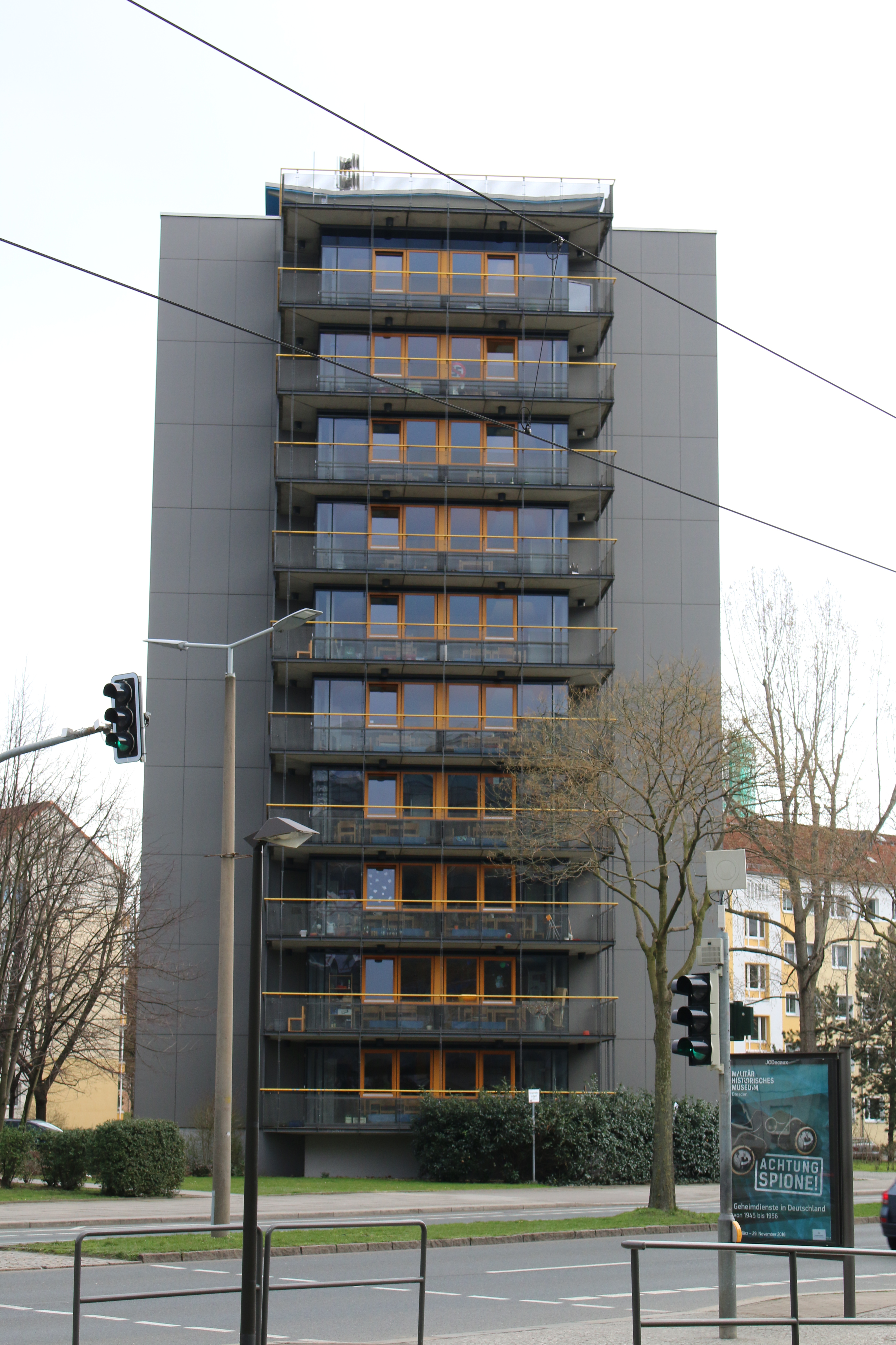 St. Petersburger Straße 29, Dresden (Blick von der Haltstelle Walpurgisstraße)